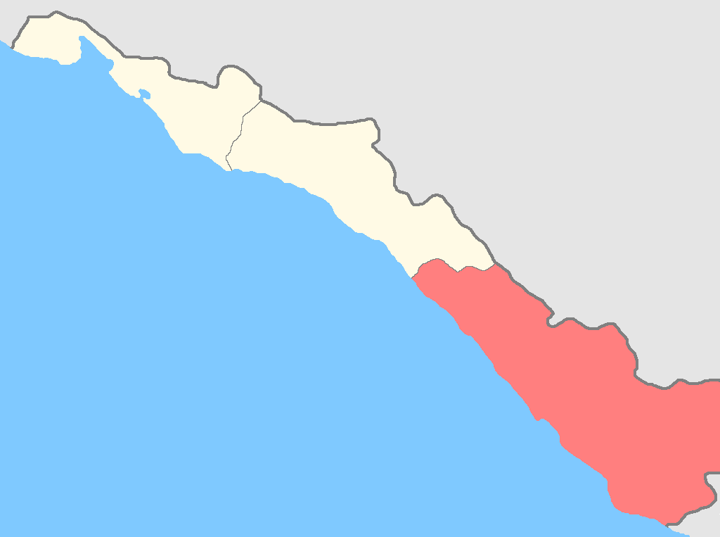 Сочинский округ на карте Черноморской губернии